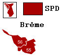 Couleur des 2 Districts de Brême lors des élections fédérales générales de 2009.